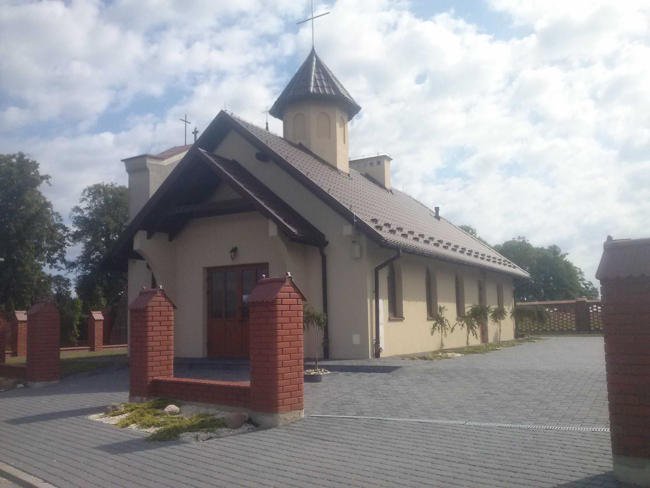 Kaplica pogrzebowa w Dębnie